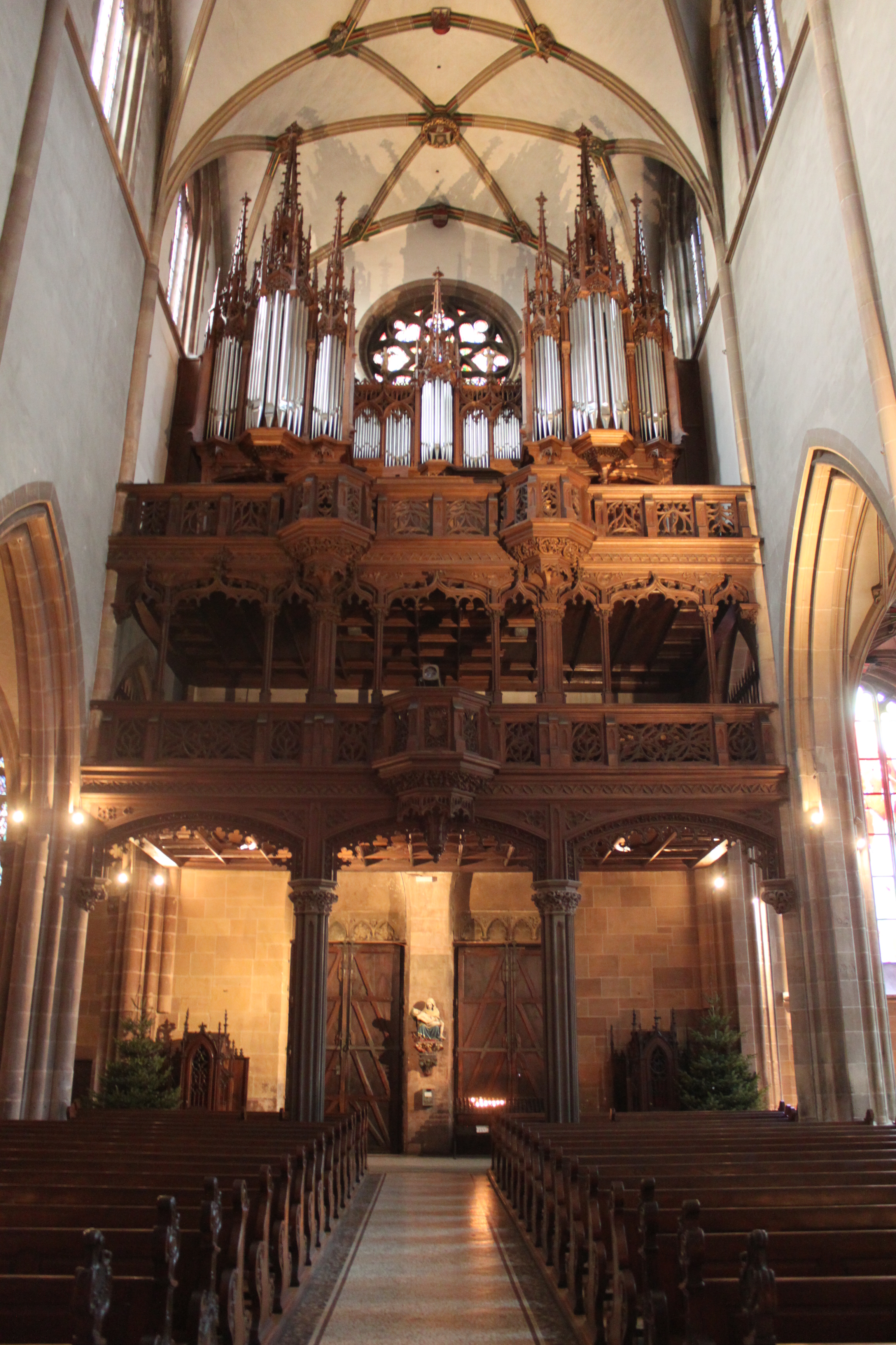 Thann, Haut-Rhin, Alsace, France